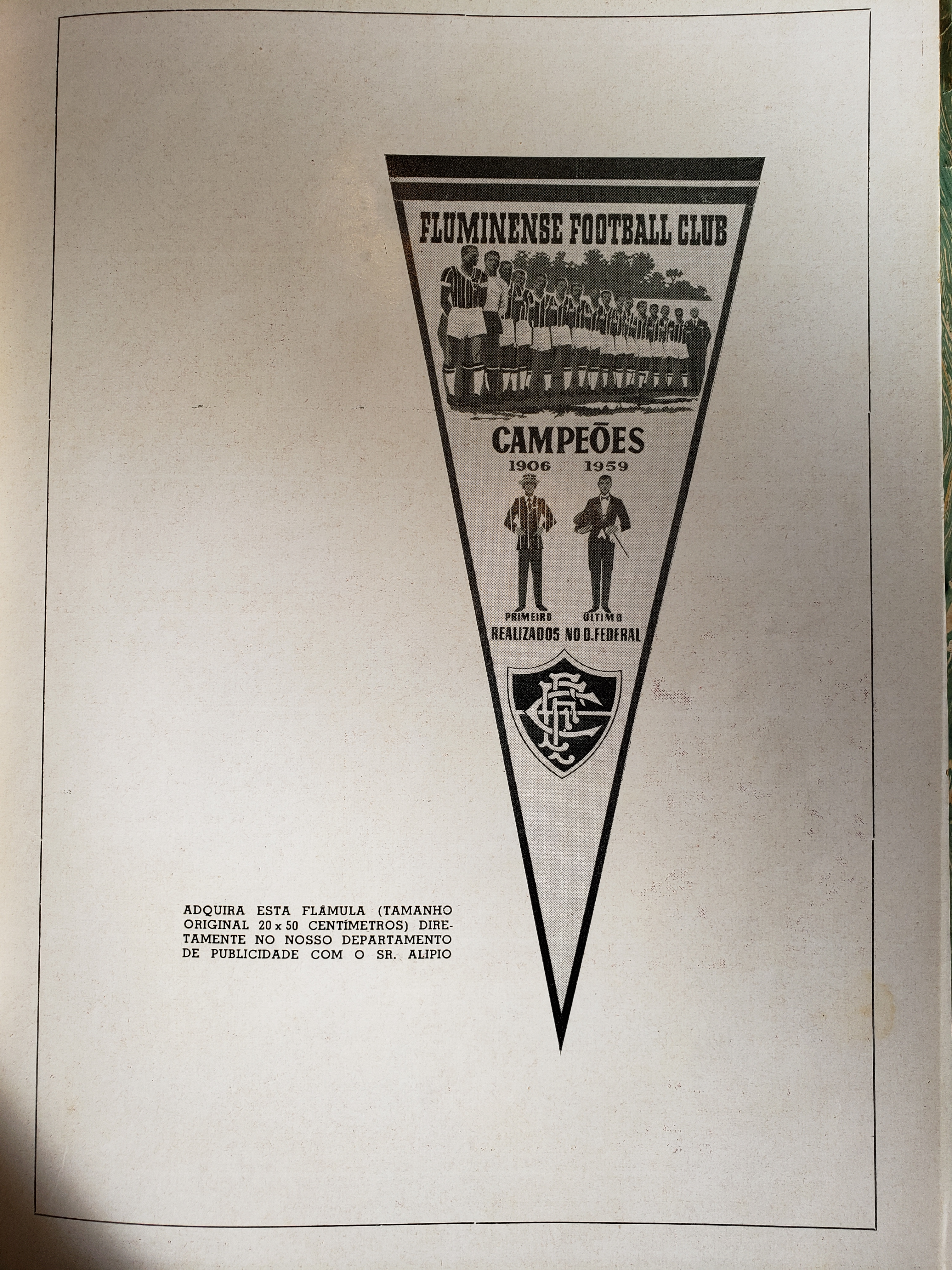 Flâmula da conquista do Campeonato Carioca de 1959 divulgada na Revista do Fluminense.